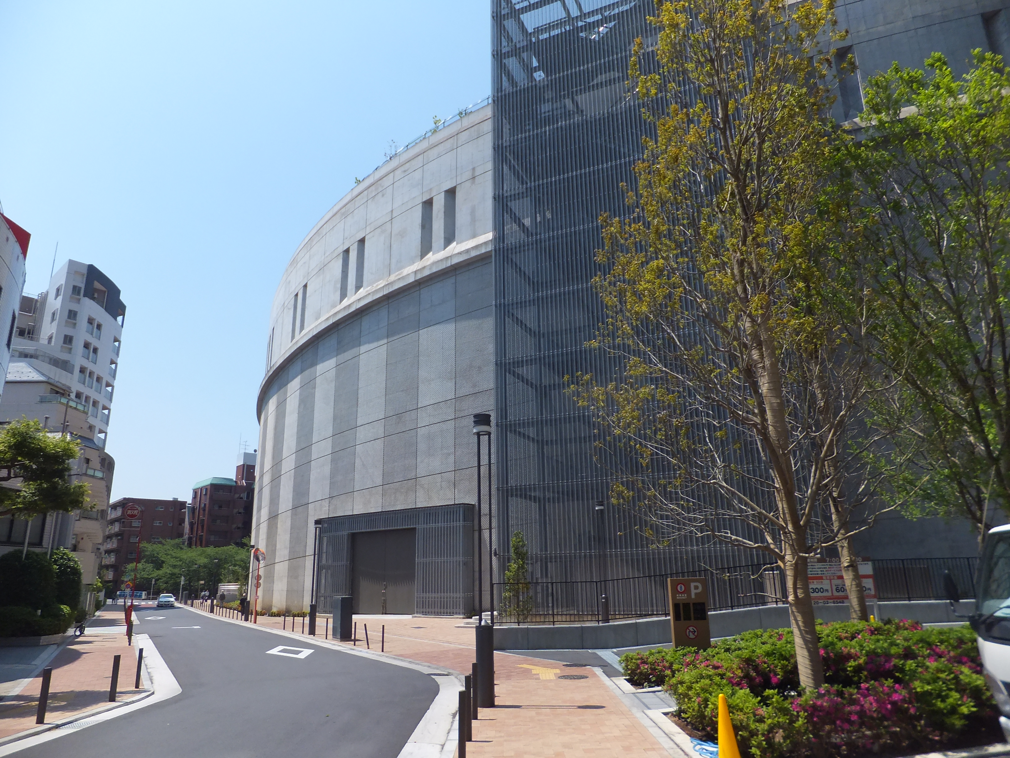 首都高速道路、大橋ジャンクション。建設面積では国立競技場にも匹敵する巨大施設だが、周辺への圧迫感を軽減するデザインとしている。